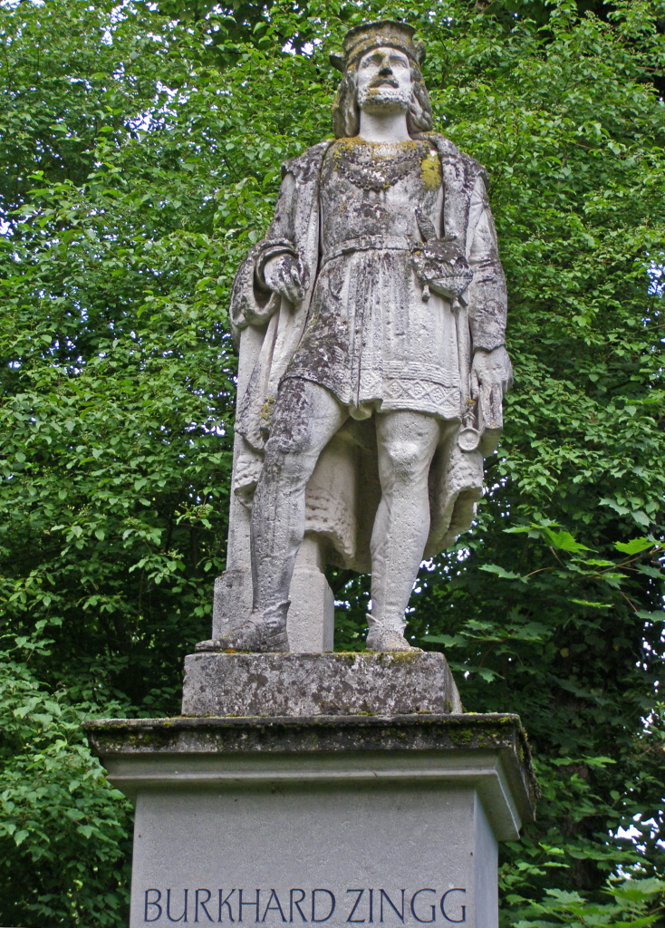 Denkmal für Burkhard Zingg in Memmingen . Bildhauer: Johannes Leeb